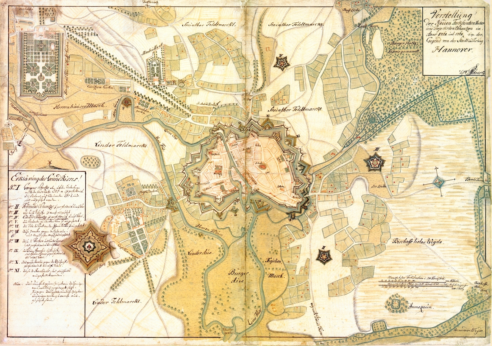 Hannoverkarte von Johann Friedrich Schrieck